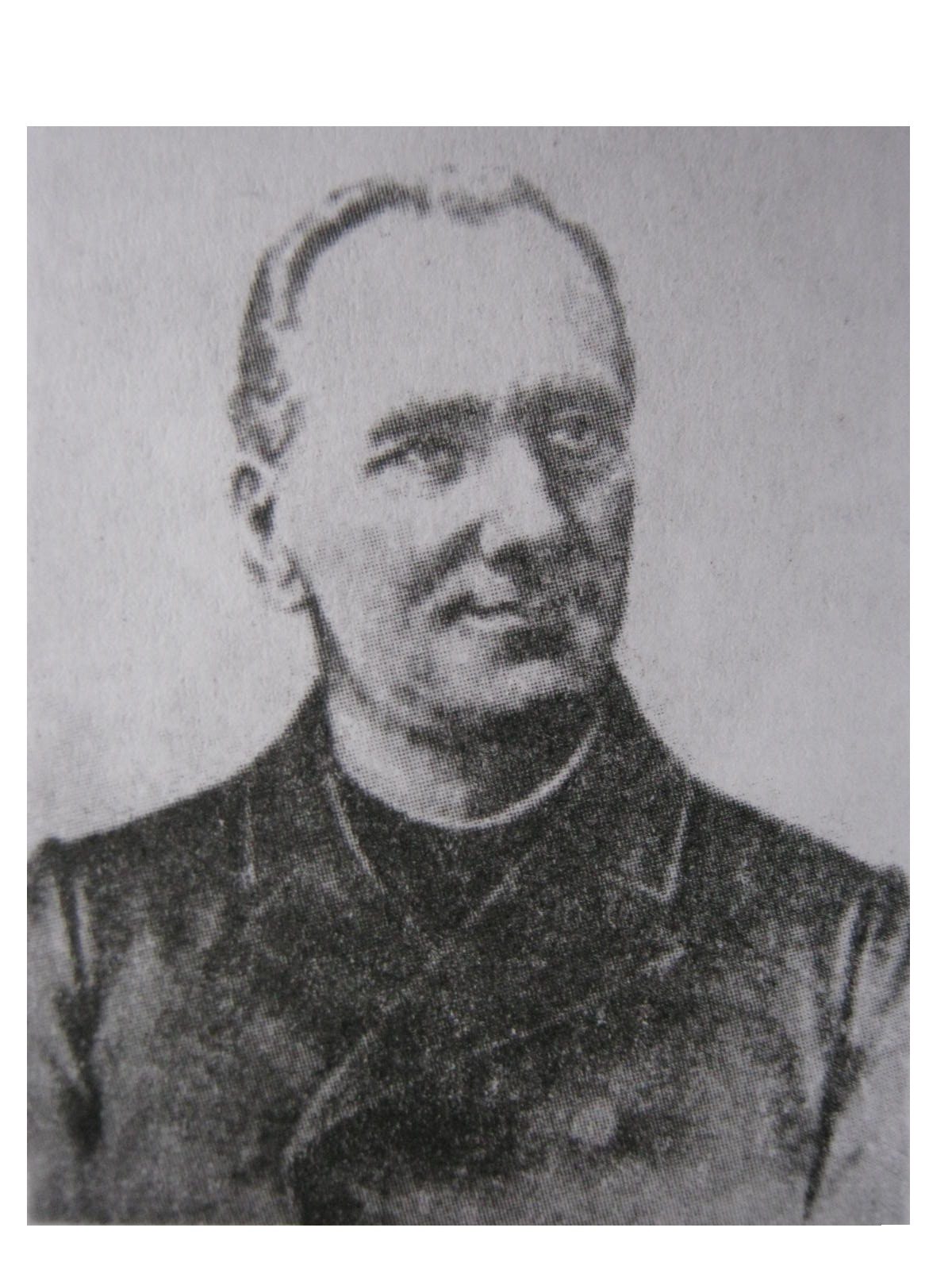 Кирило Гаморак